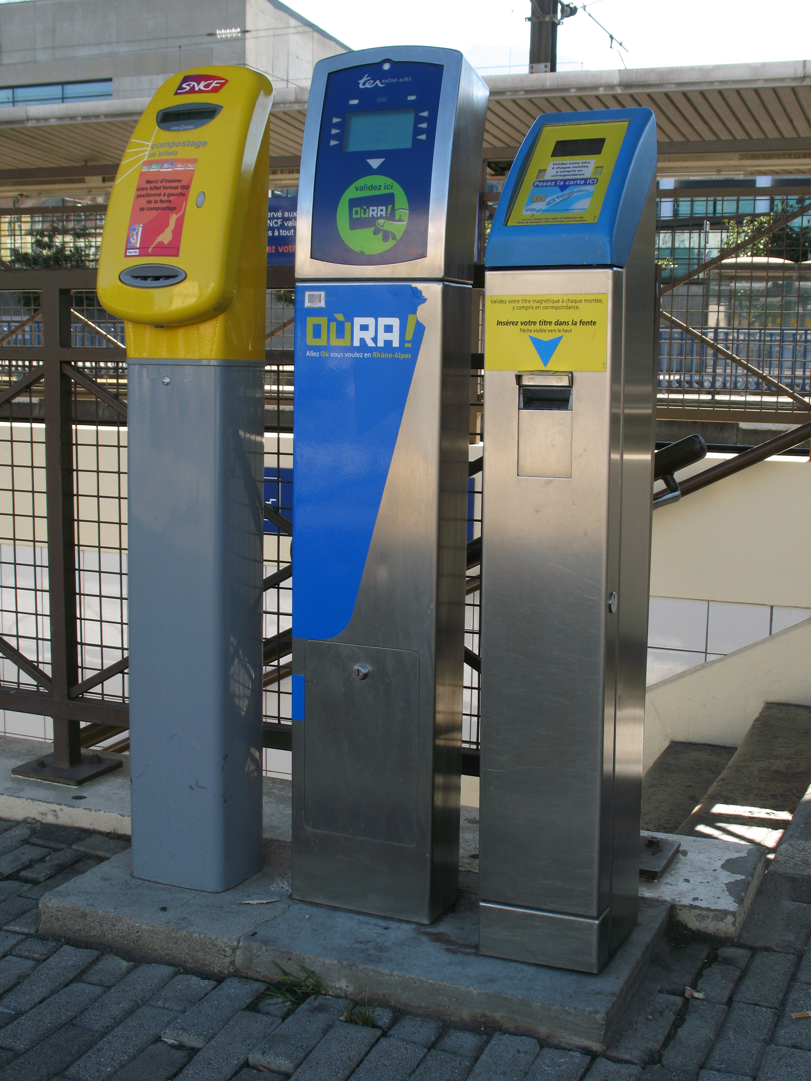 Valideurs de billets, tickets et cartes de transport nationaux (SNCF), régionaux (TER Oùra) et urbains (TAG) en gare de Grenoble (France).